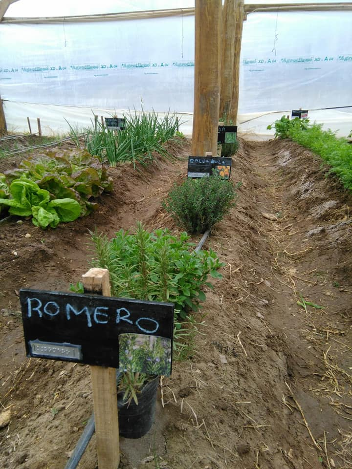 invernadero